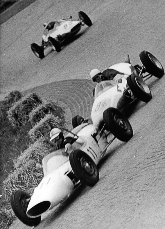 Zentralbild Kohls 20.5.1962 Auto- und Motorradrennen auf der "Bernauer Schleife" Am 20.5.1962 wurde auf der "Bernauer Schleife" das 8. Auto- und Motorradrennen ausgetragen. Sportler aus Frankreich, Finnland, Polen, Belgien und der DDR gaben sich ein Stelldichein. UBz: Im international besetzten Rennen der Formel Juniorwagen mußte der Pole Jankowski sehr schnell die Führung wieder abgeben."